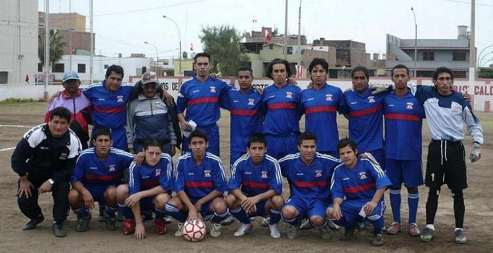 Equipo de fútbol de la Asociación Deportiva Somos Aduanas, antes de su encuentro frente a Defensor Tacna, el 27.07.2008, por el Campeonato de Fútbol de la Liga La Perla - Bellavista (Federación Departamental de Fútbol del Callao)